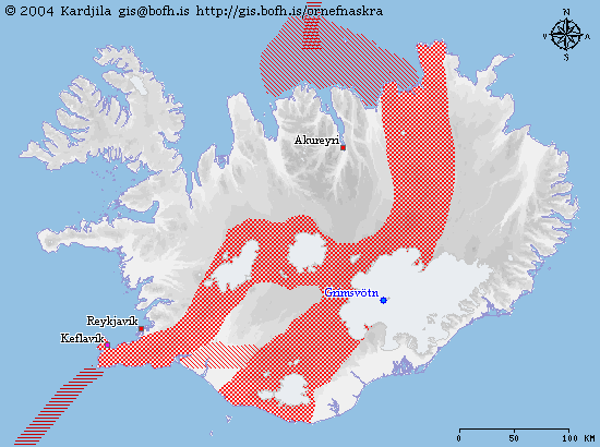 Grímsvötn